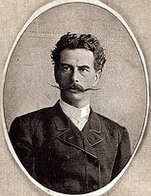 Александровский С.Ф. (1842-1906) - русский художник